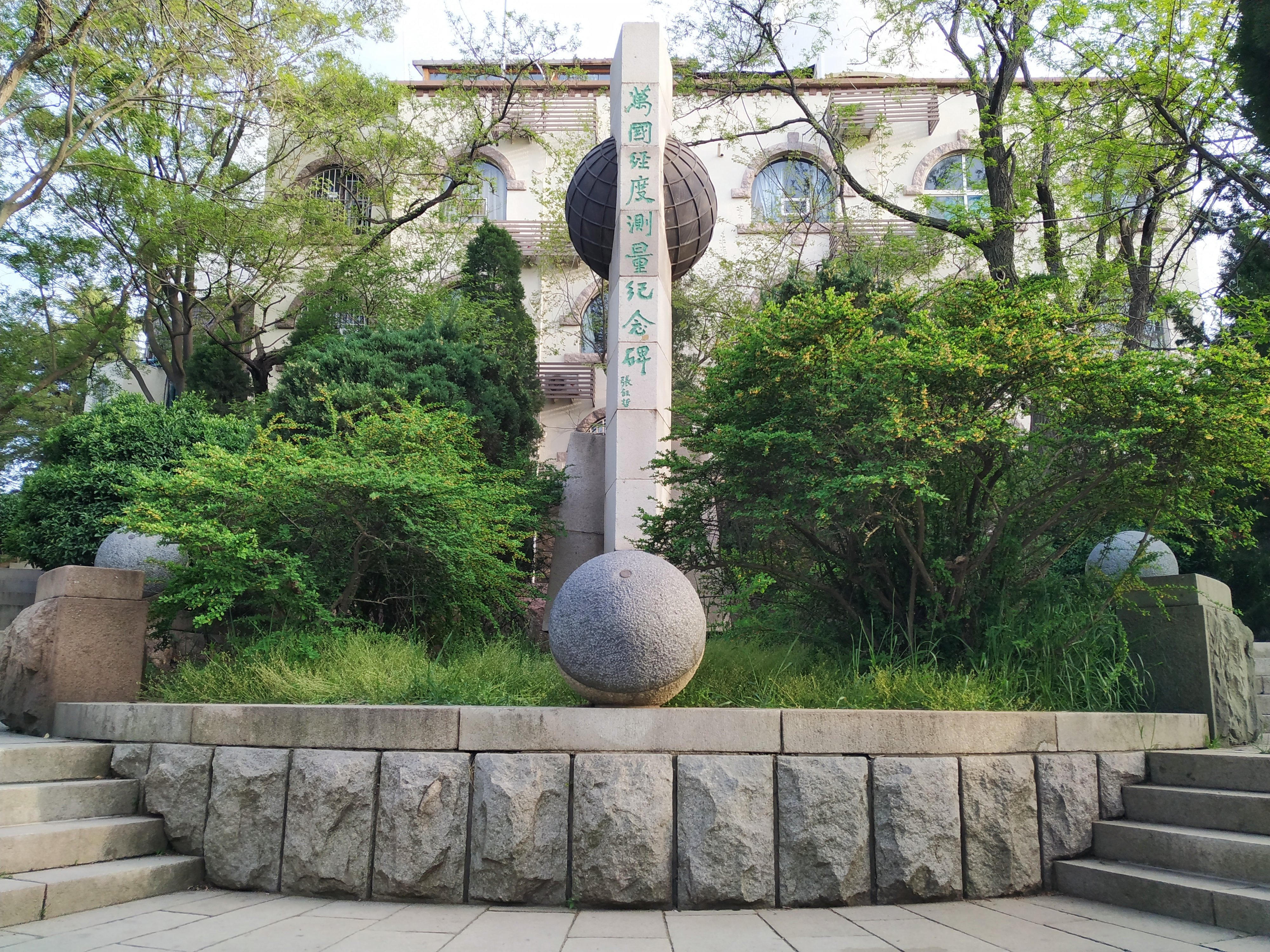 中文（中国大陆）: 青岛观象山上的万国经度测量纪念碑